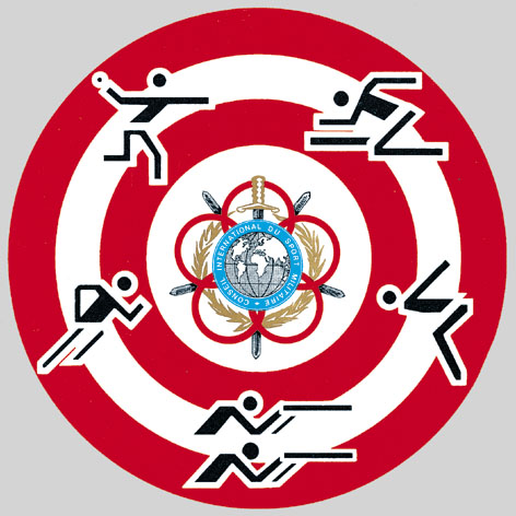 Símbolo da modalidade desportiva Pentatlo Militar